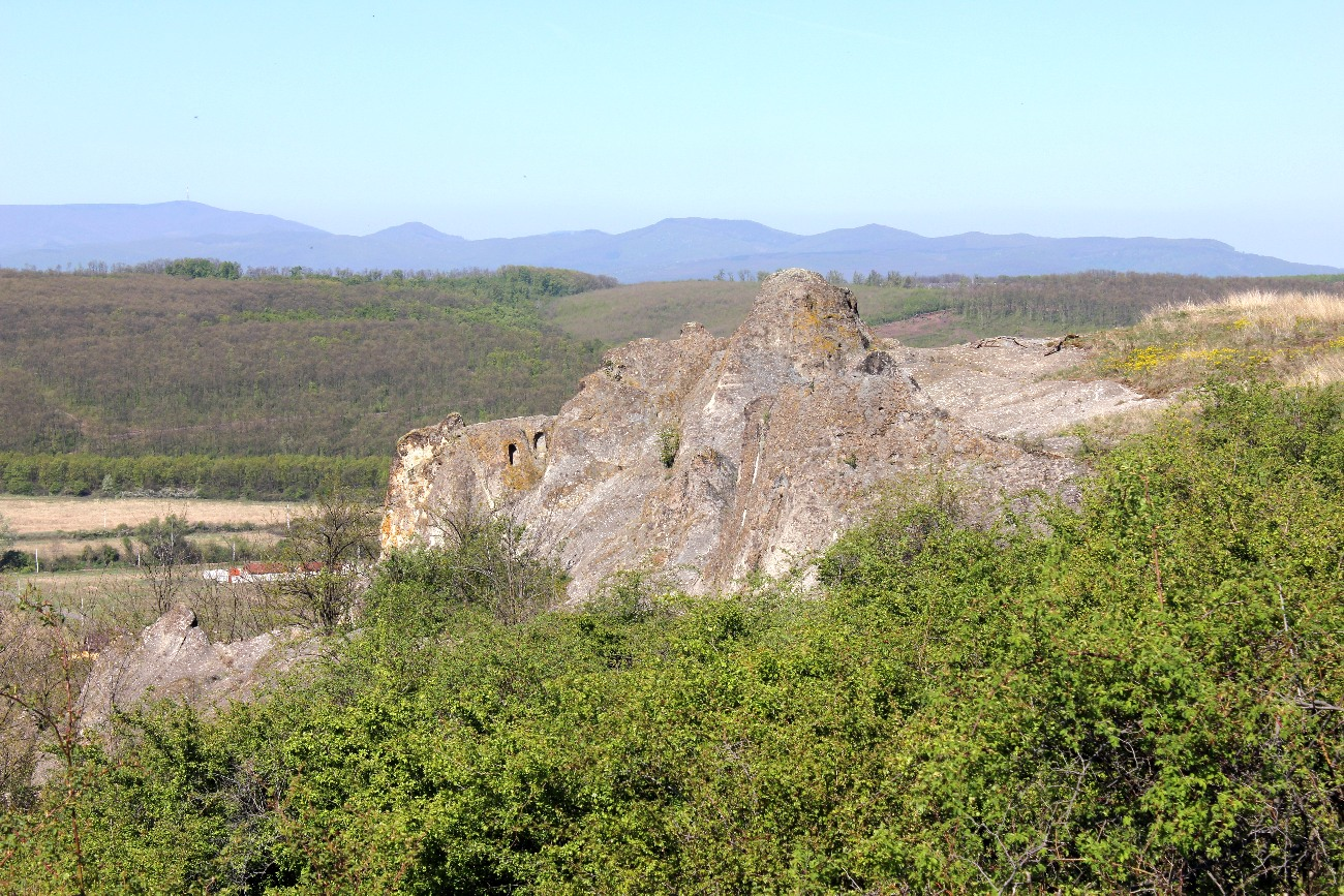 H4b, Demjén, Hegyeskő-tető